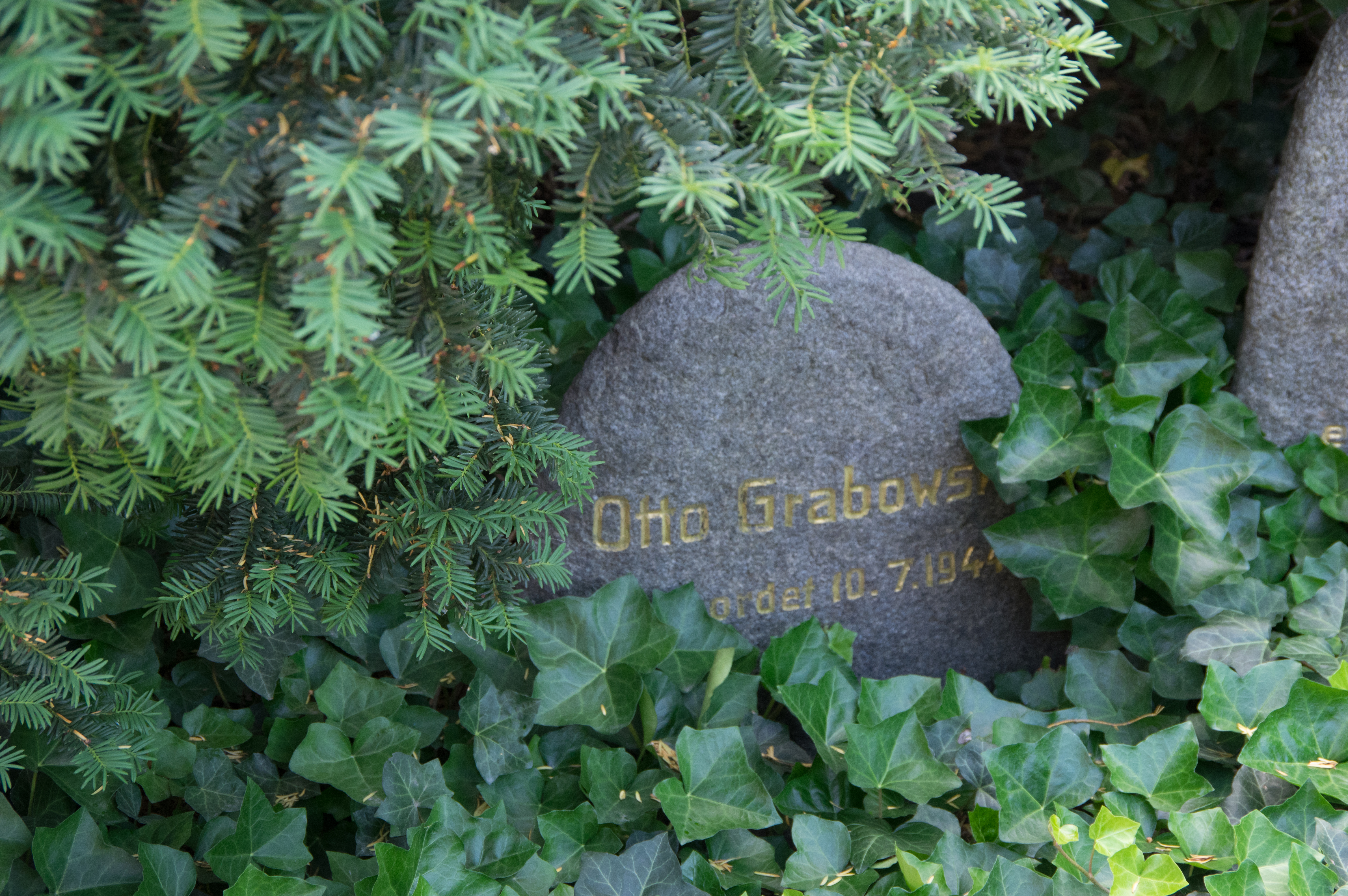 Wildau in Brandenburg. Die Gedenkdenkstein erinnern an Antifaschisten.